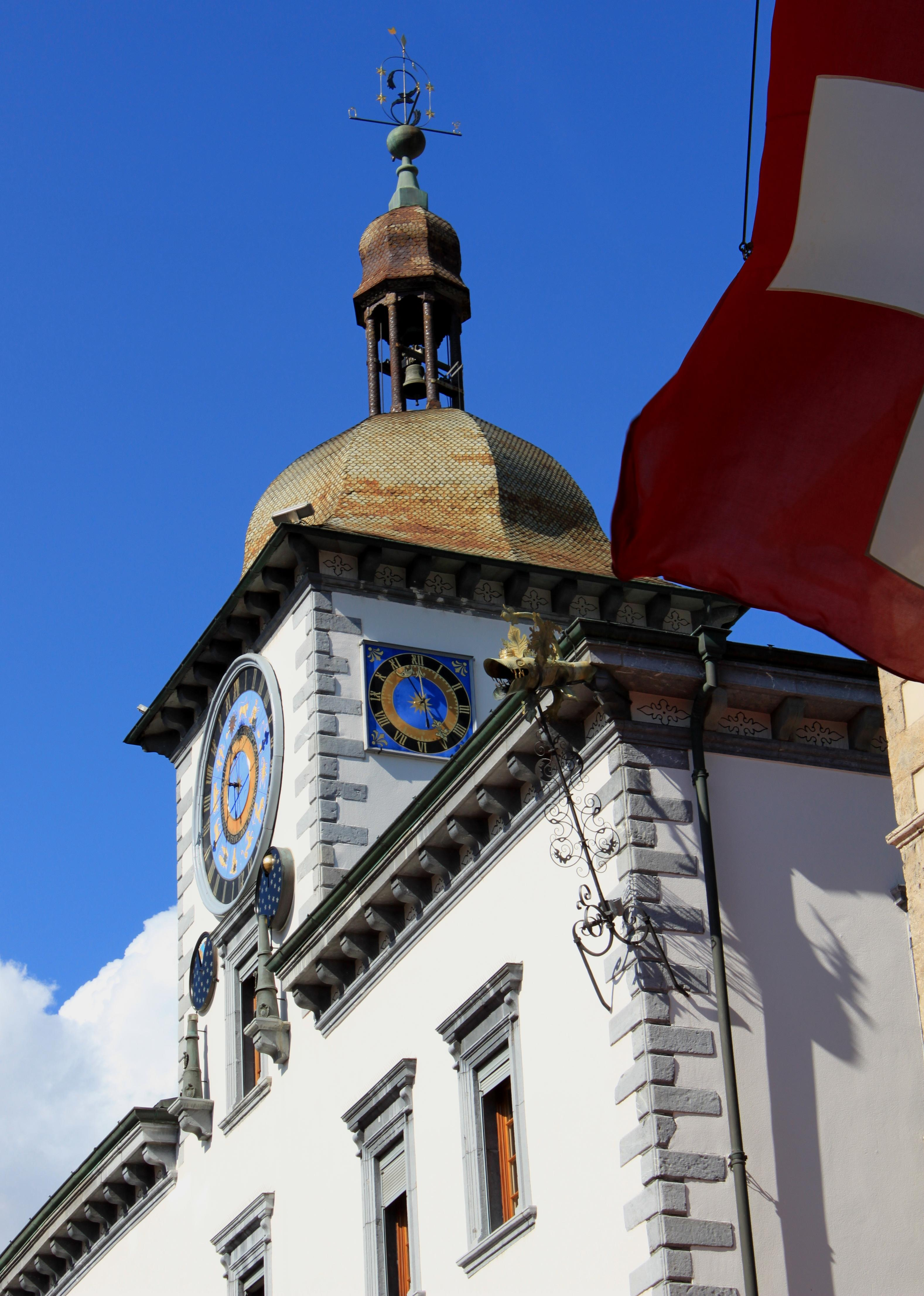 Suisse, canton du Valais, Sion, Hôtel de ville et son horloge astronomique, date du 12e siècle. Ses portes sont ornées de boiseries décoratives.